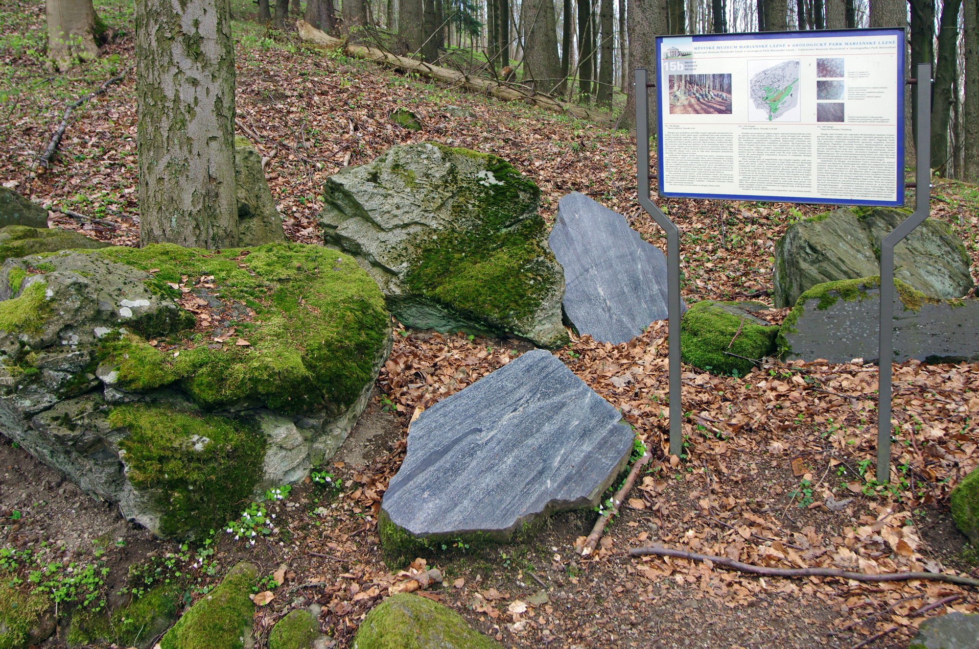 Mariánské Lázně Geopark zastavení č. 15b - eklogit